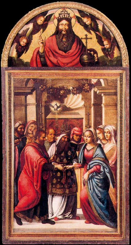 La obra representa a la Virgen María, la madre de Jesucristo, contrayendo matrimonio con San José.